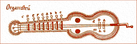 Organistrum de De cantatu y musica sacra; Autor:Martin Gerber, copiado en 1774 del Códice de San Basilio del Monasterio de Sankt Blasien (Alemania).